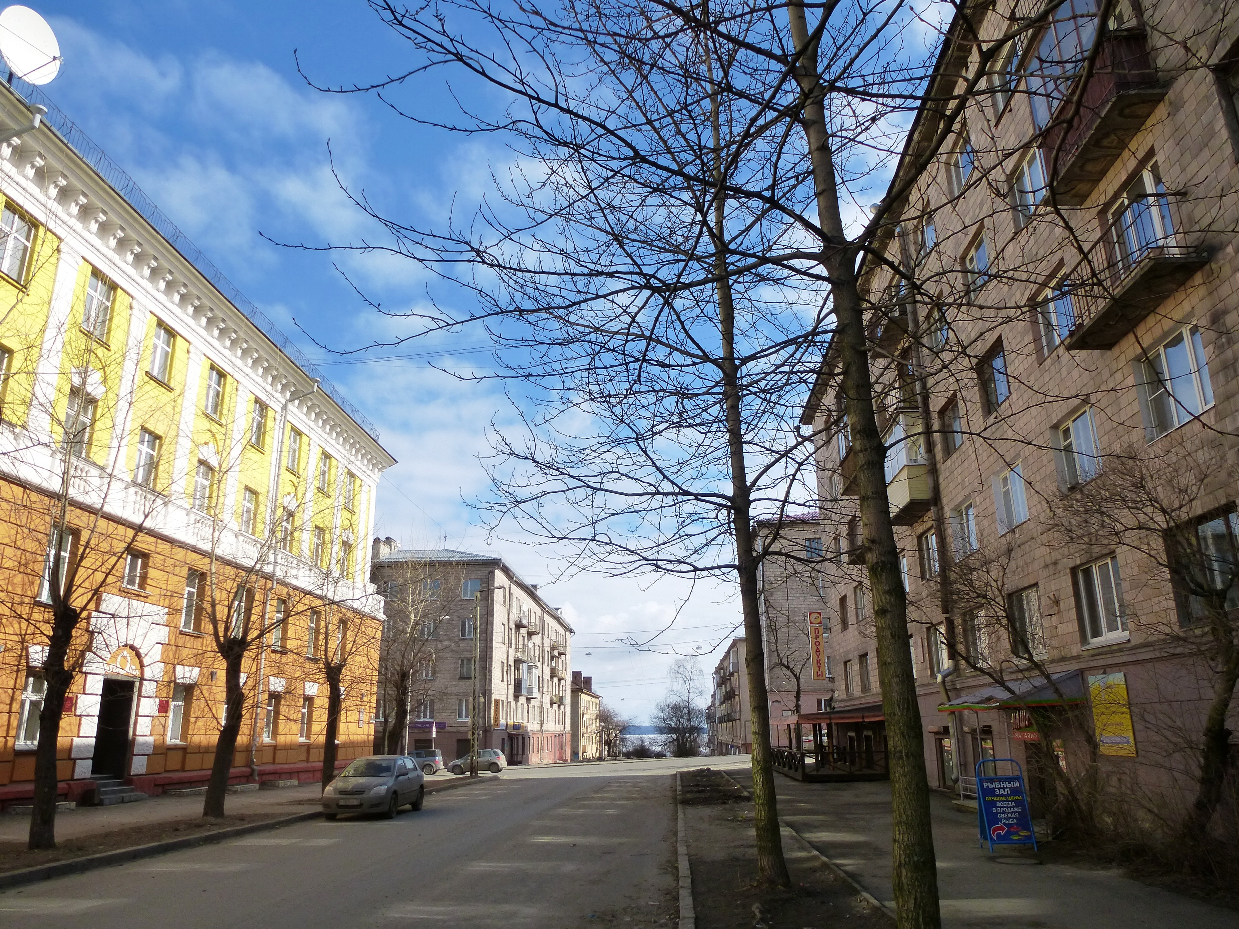 Улица Свердлова в Петрозаводске